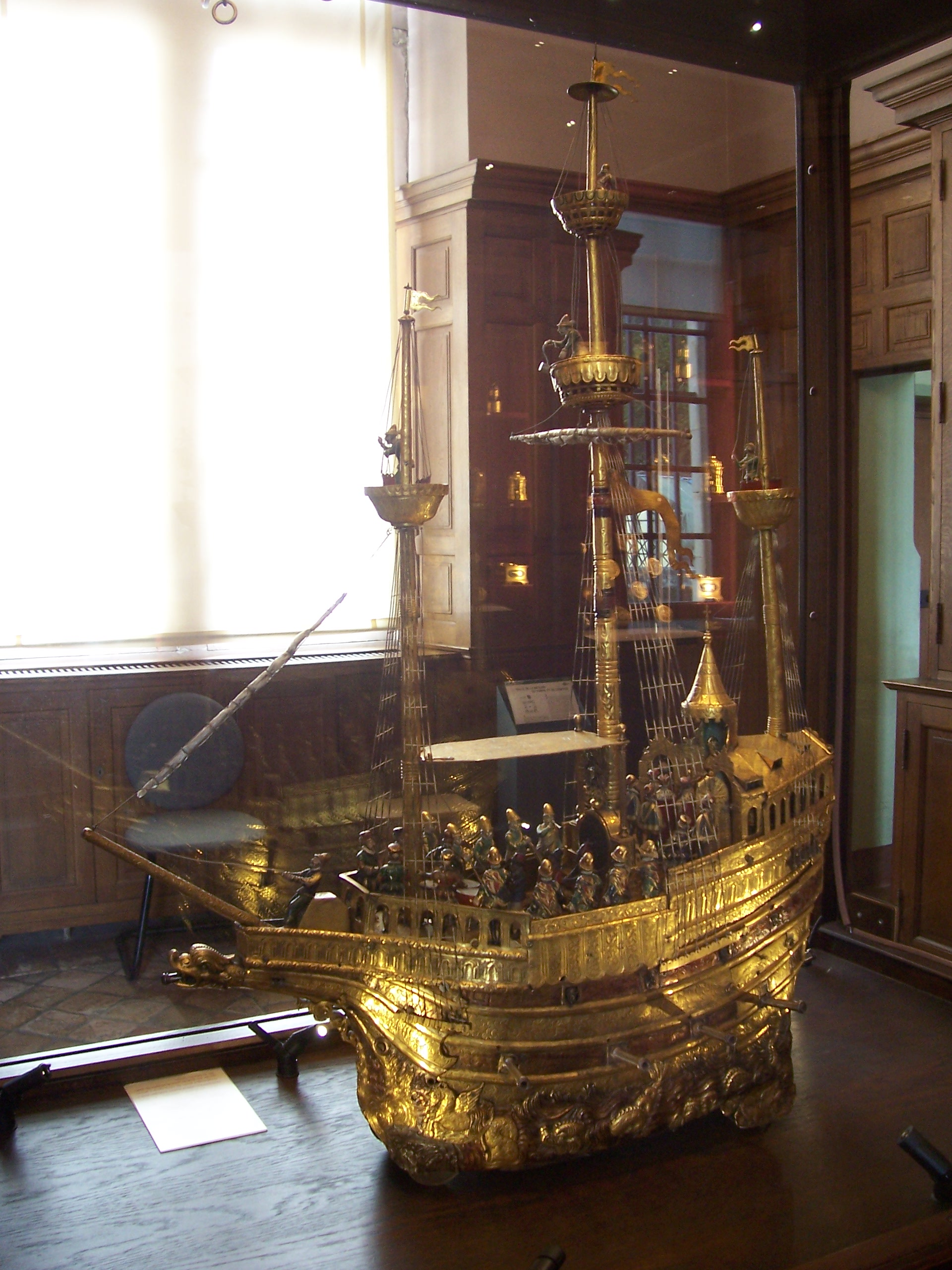 horloge mobile représentant un navire